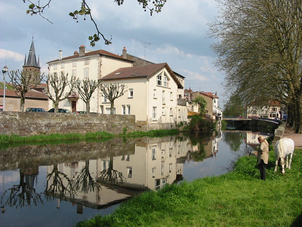 La Mortagne Commune de Rambervillers Département des Vosges Photographie personnelle, prise le 4 mai 2006 Copyright © Christian Amet